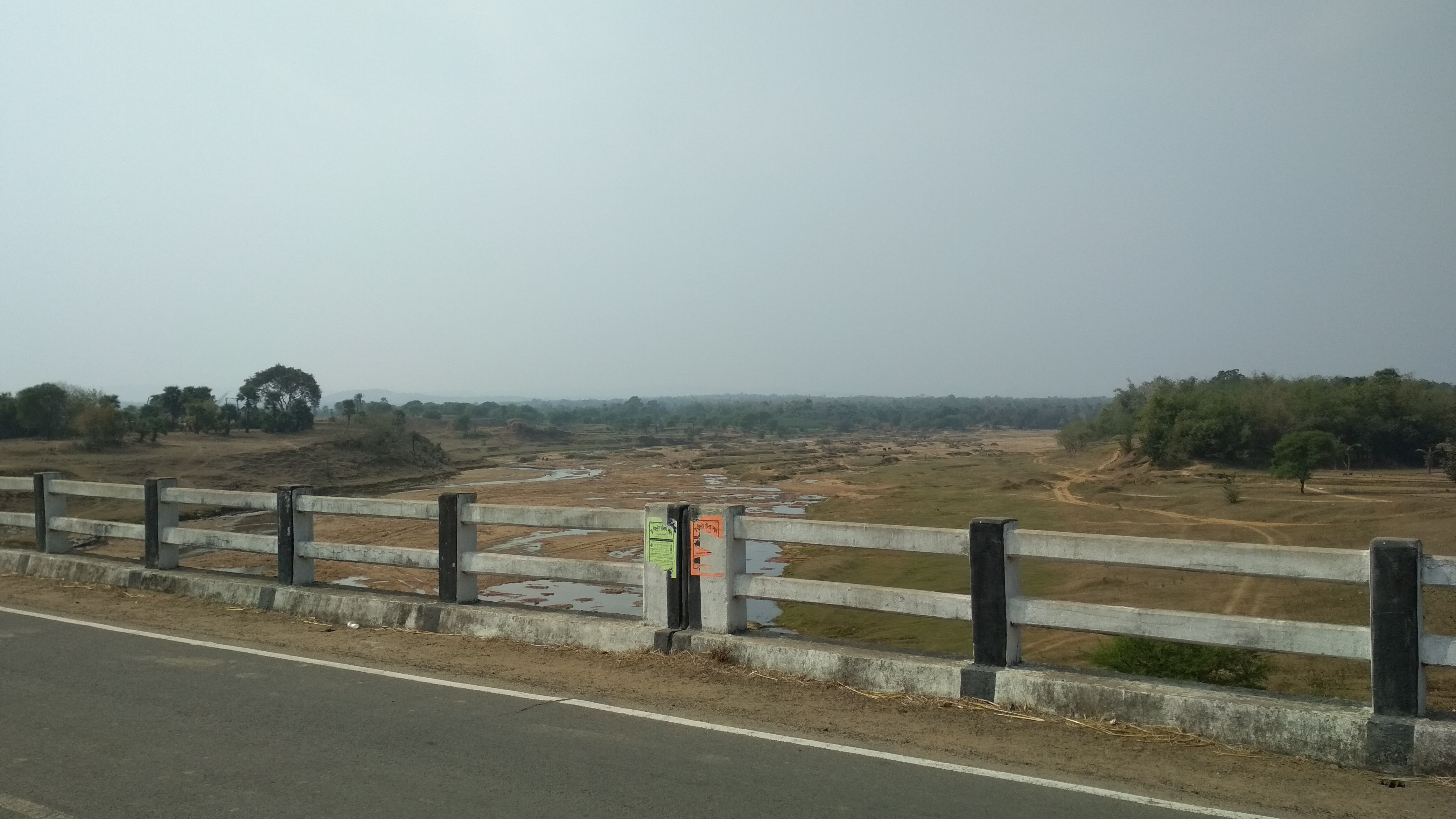 ब्राह्मणी नदी